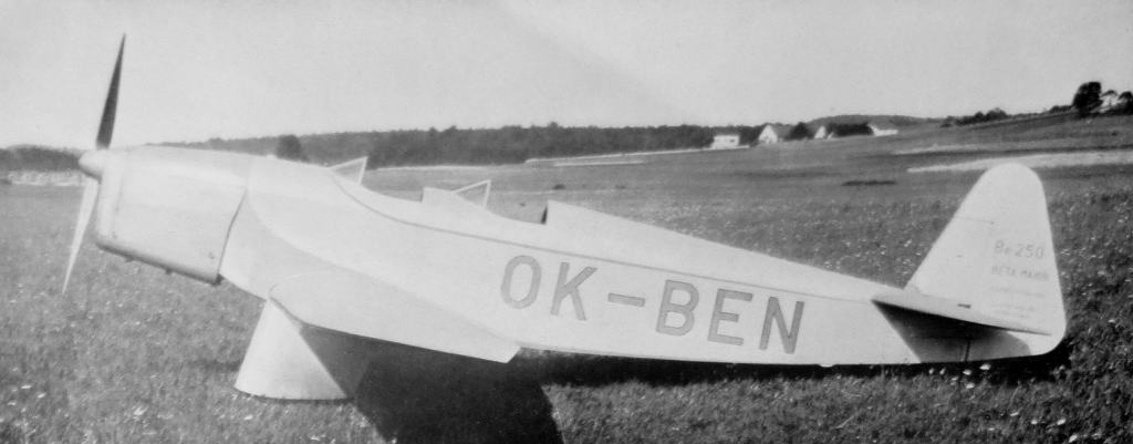 letecký motor Walter Major 4 a letoun Be-250 Beta Major (1936)